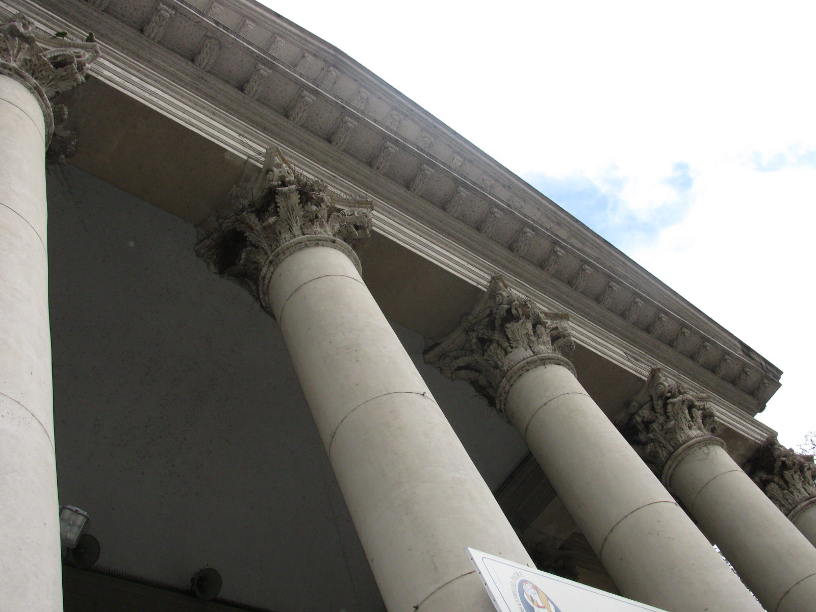 Columnas y Entablamento.